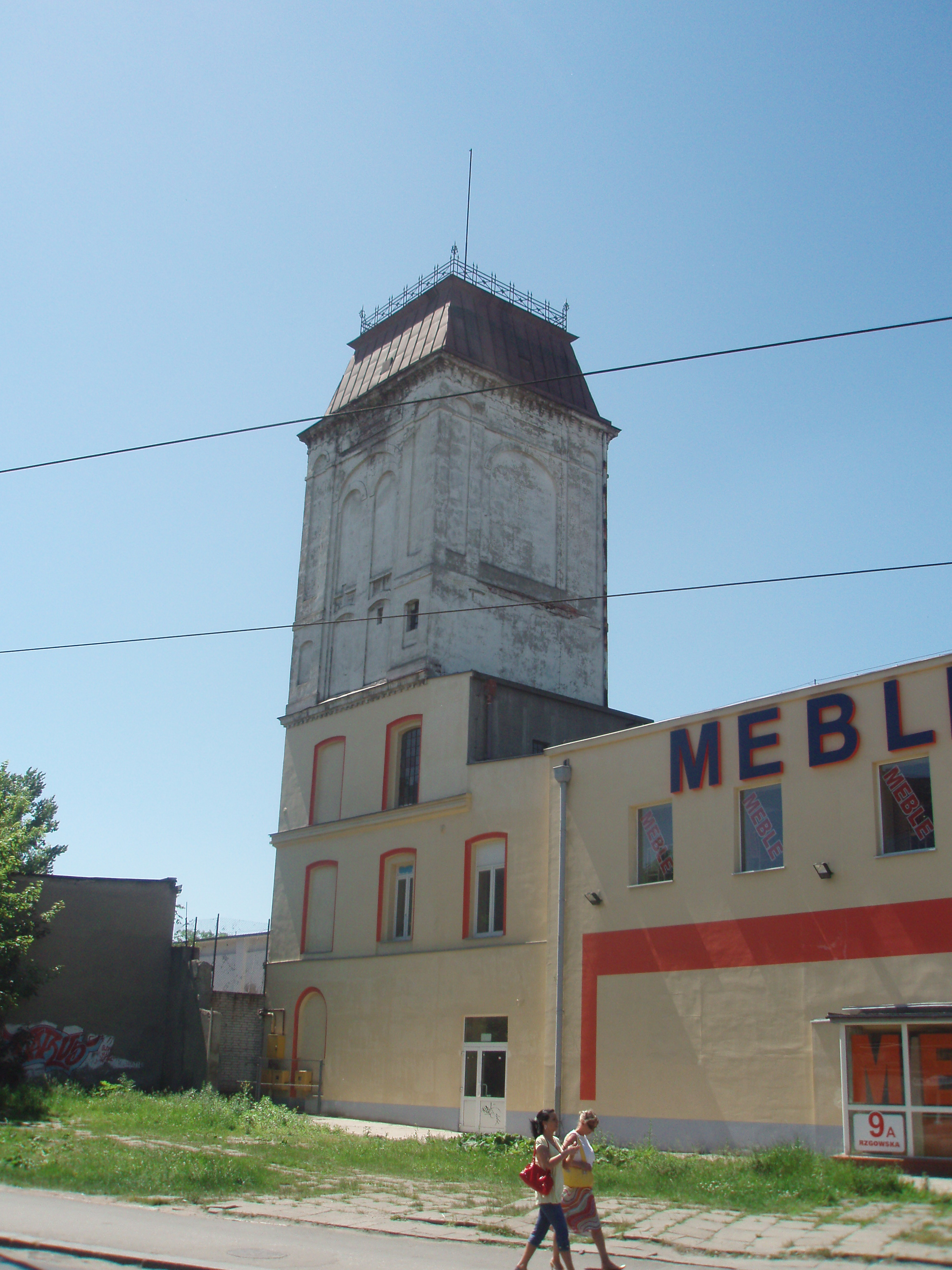 Obiekt przemysłowy przy ulicy Rzgowskiej 7